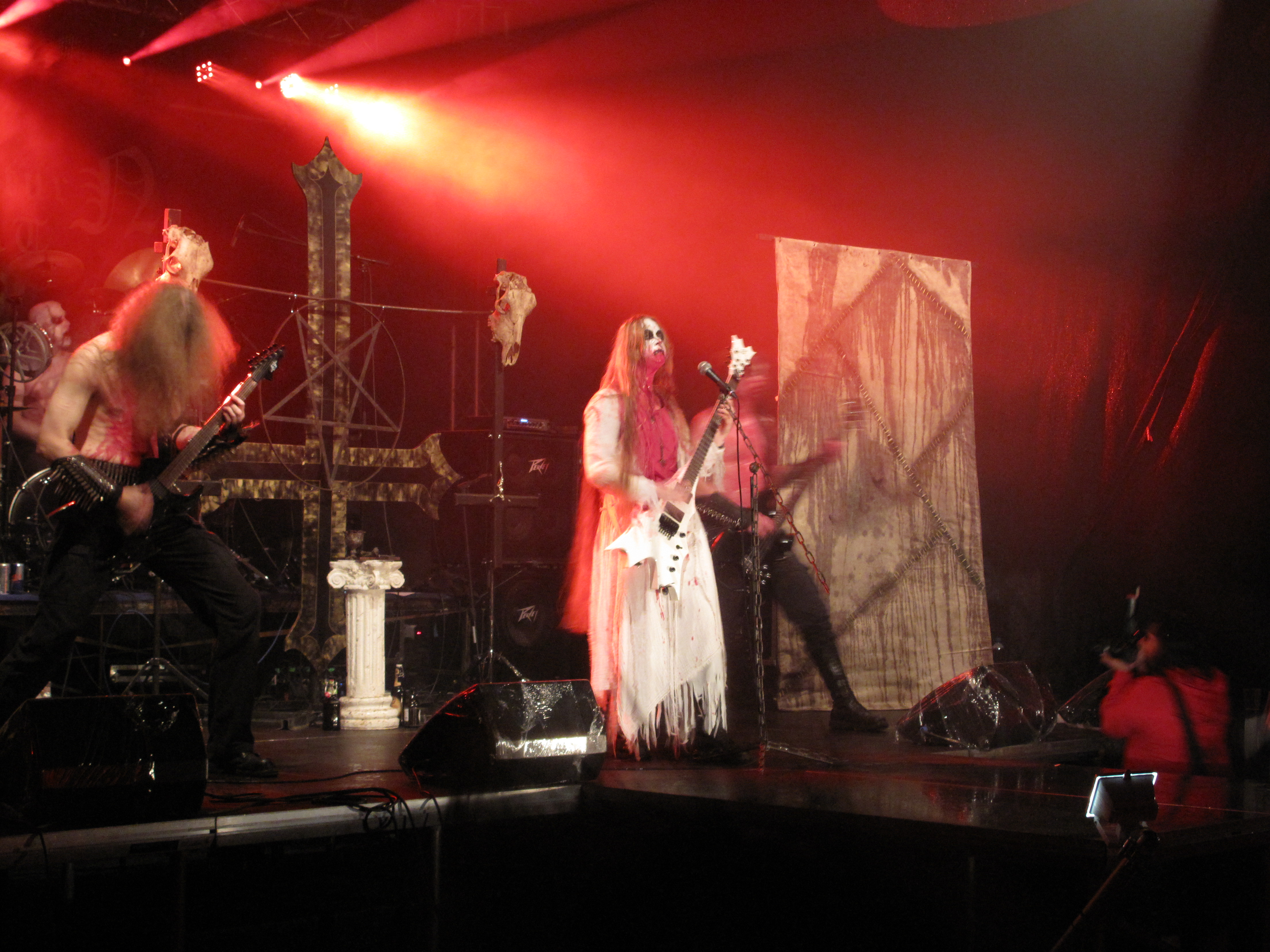 Darkened Nocturn Slaughtercult na festivalu Hell Fast Attack